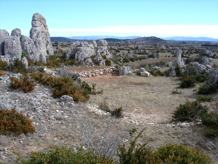 Plateau du Larzac (Aveyron, France).